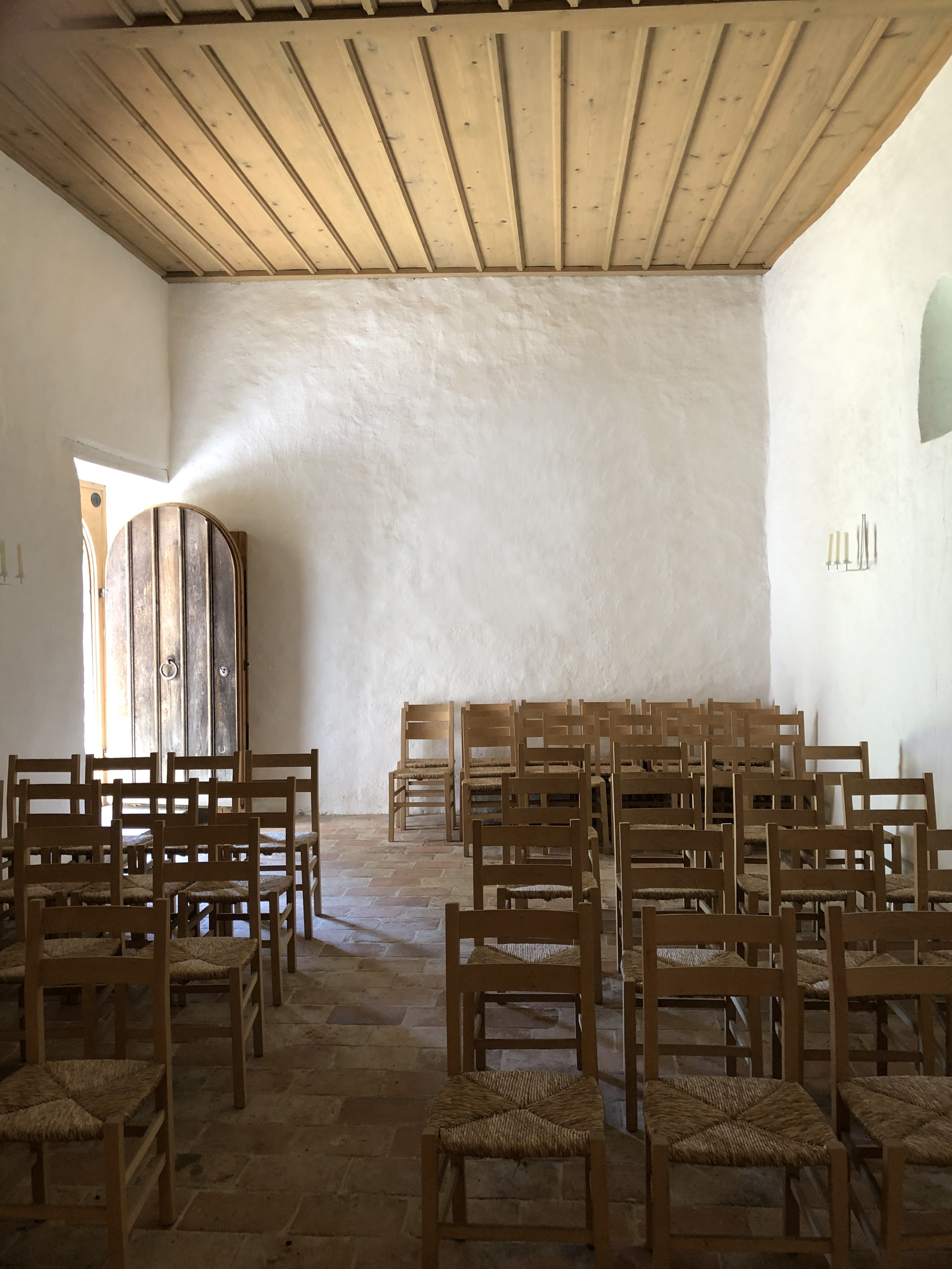 Kapelle Rossberg Innenraum